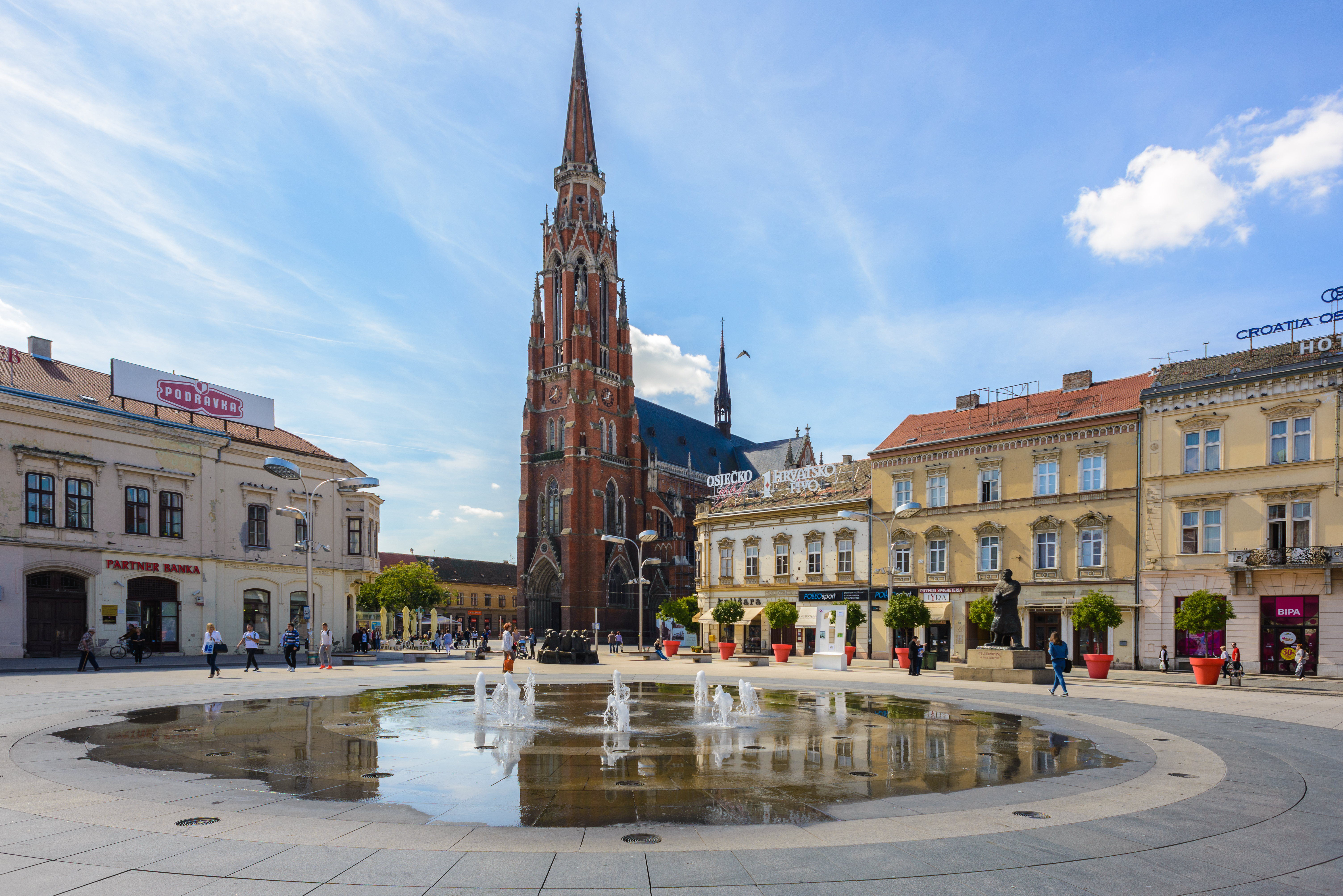 Osijek